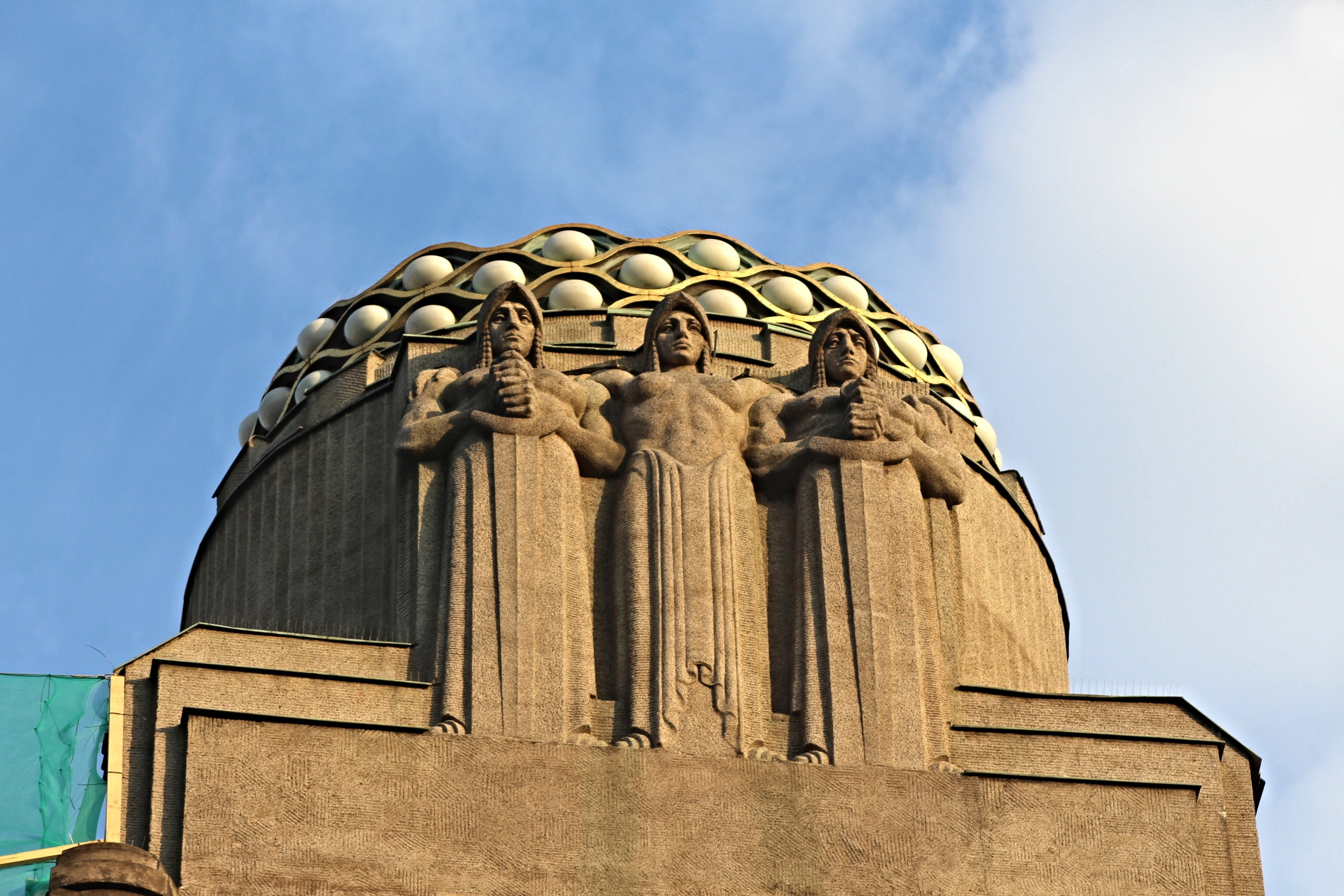 Palác Koruna na Václavském náměstí